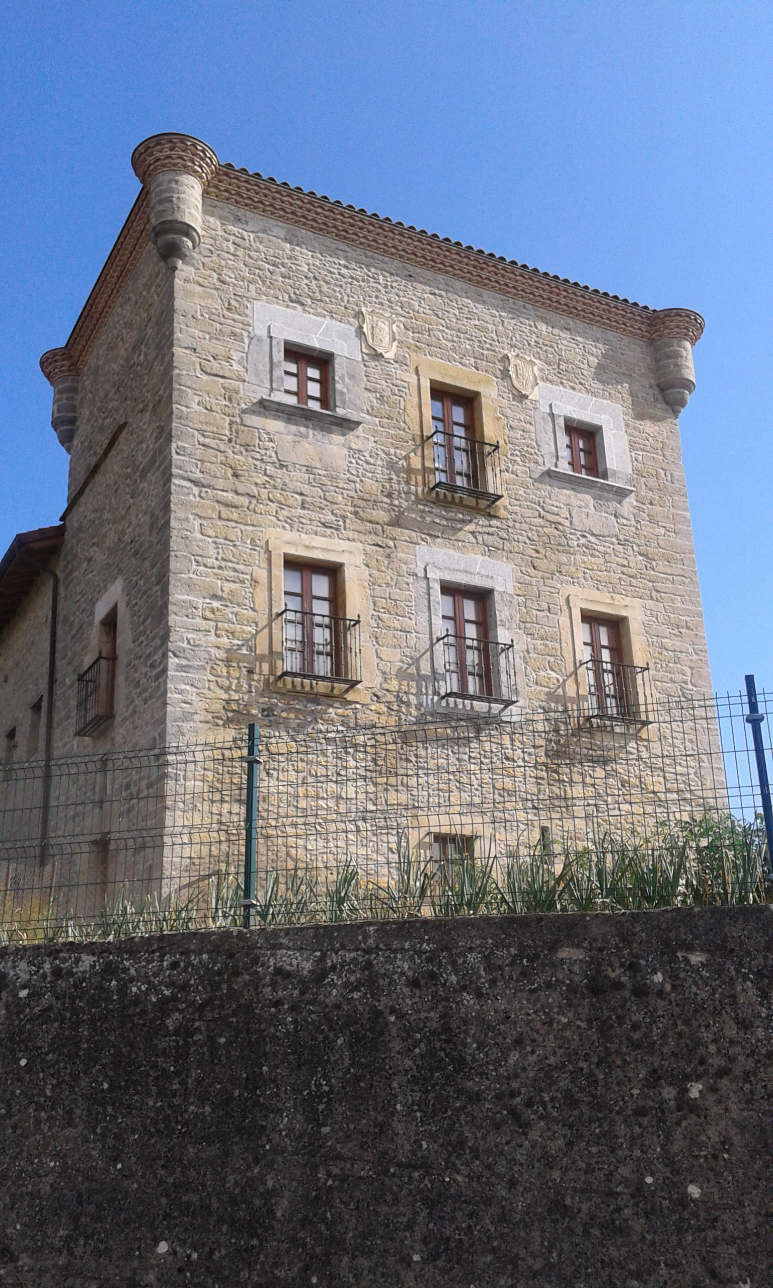 Zaitegiko Lopez Letonakoendarren dorretxea